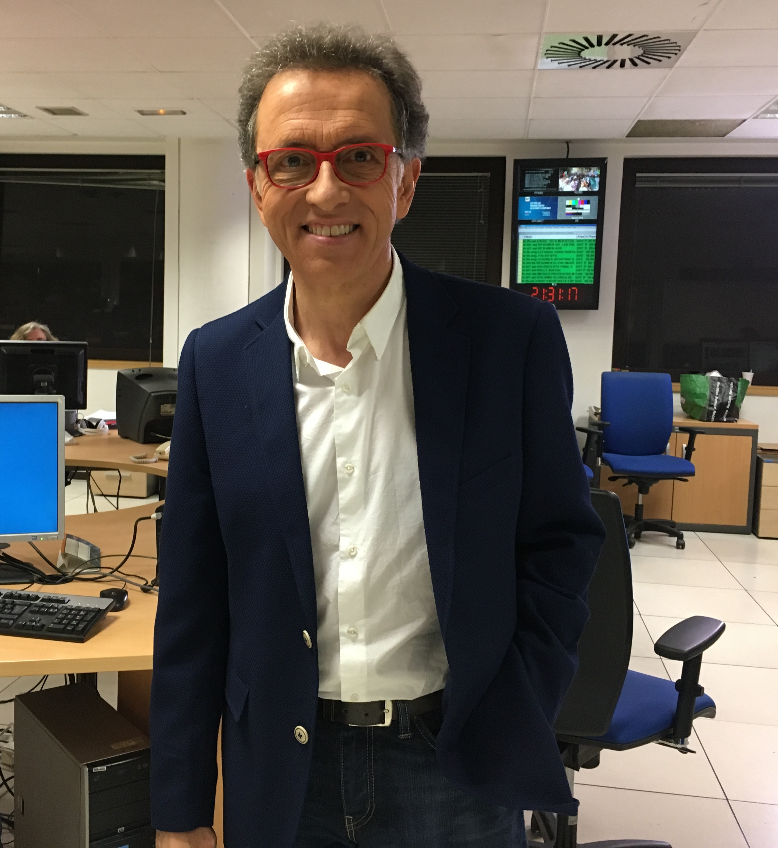 Visita a TVE de Jordi Hurtado.